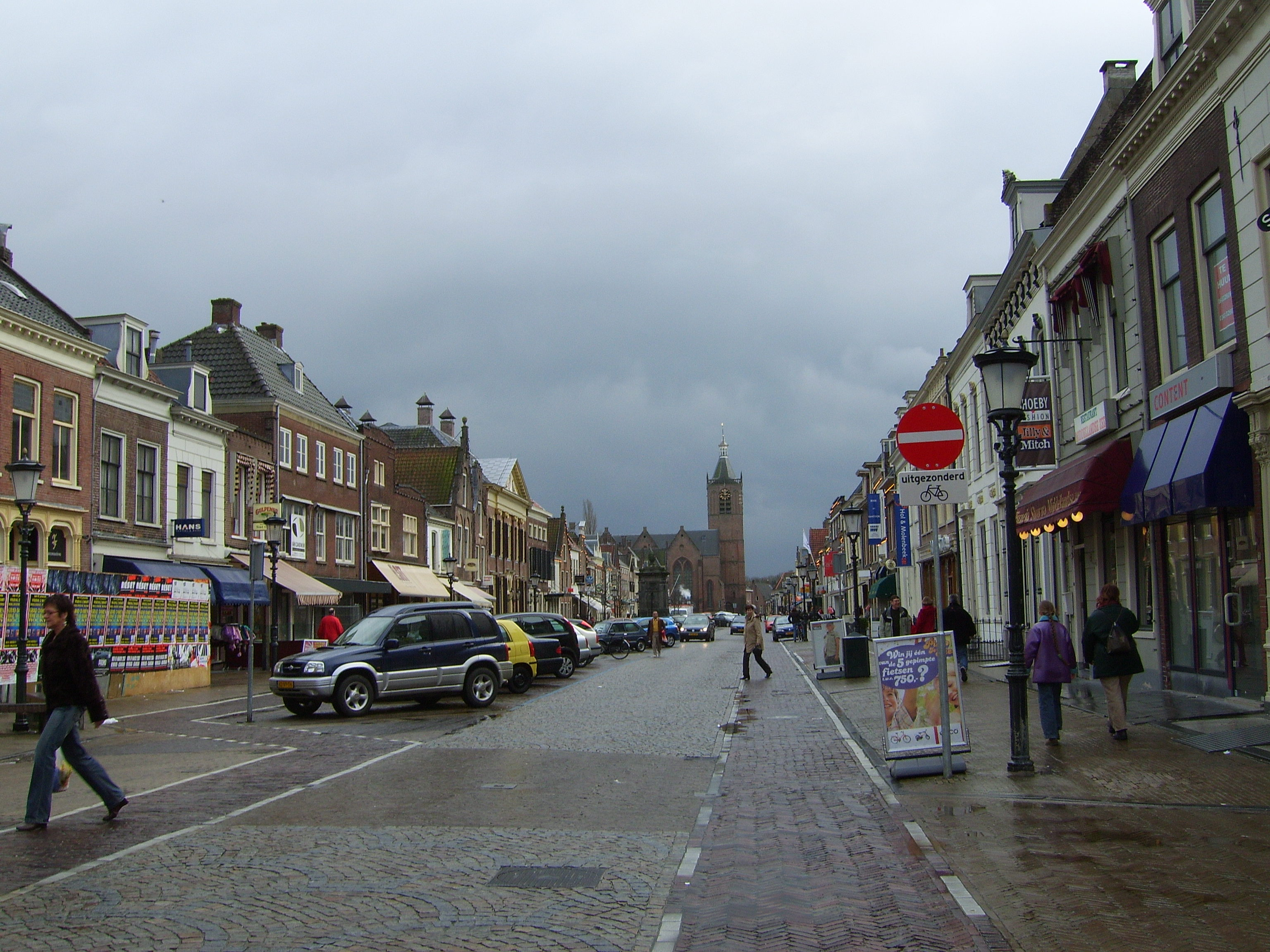 Zicht op een deel van de Voorstraat in Vianen